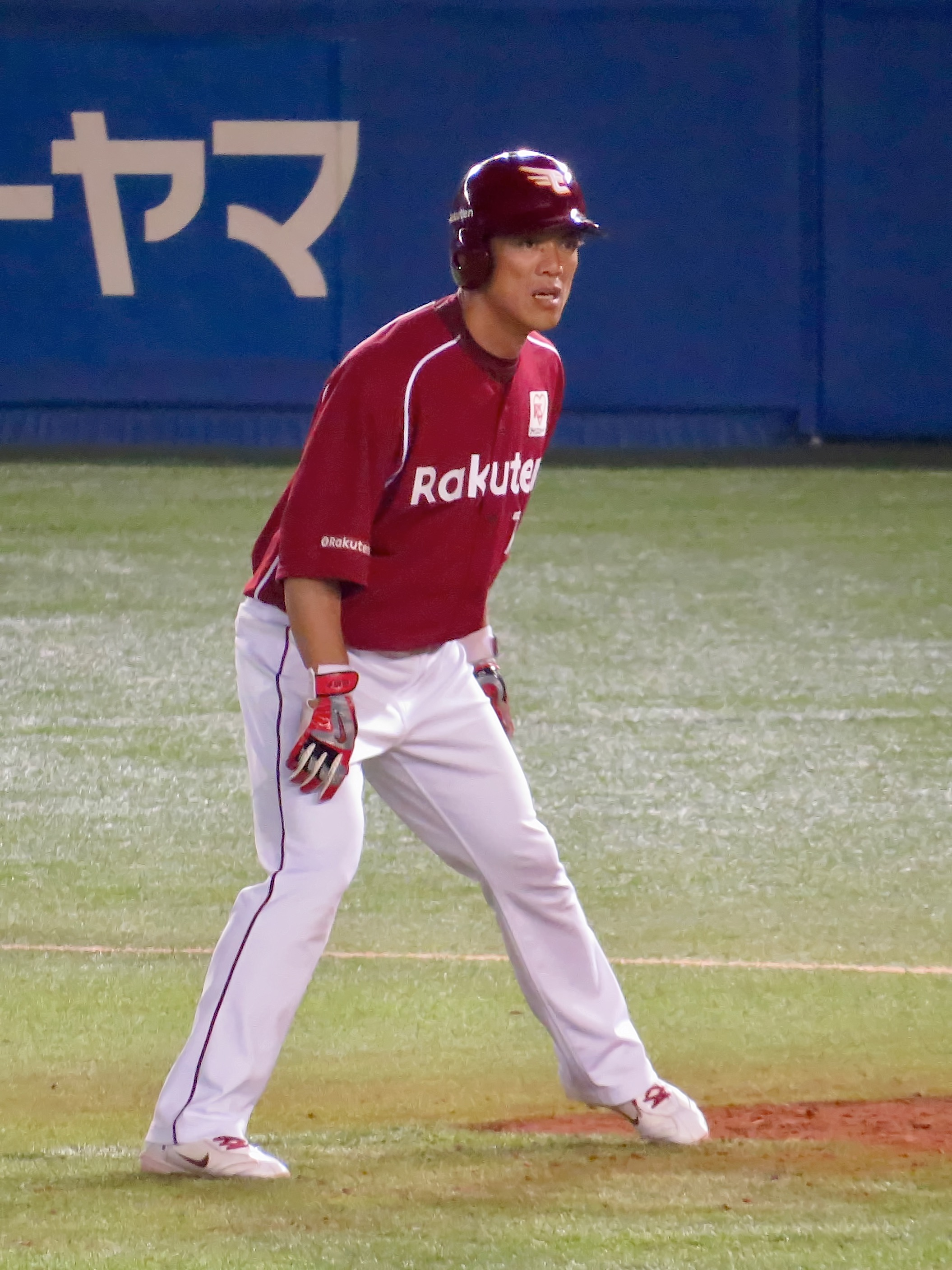 ZOZOマリンスタジアムにて